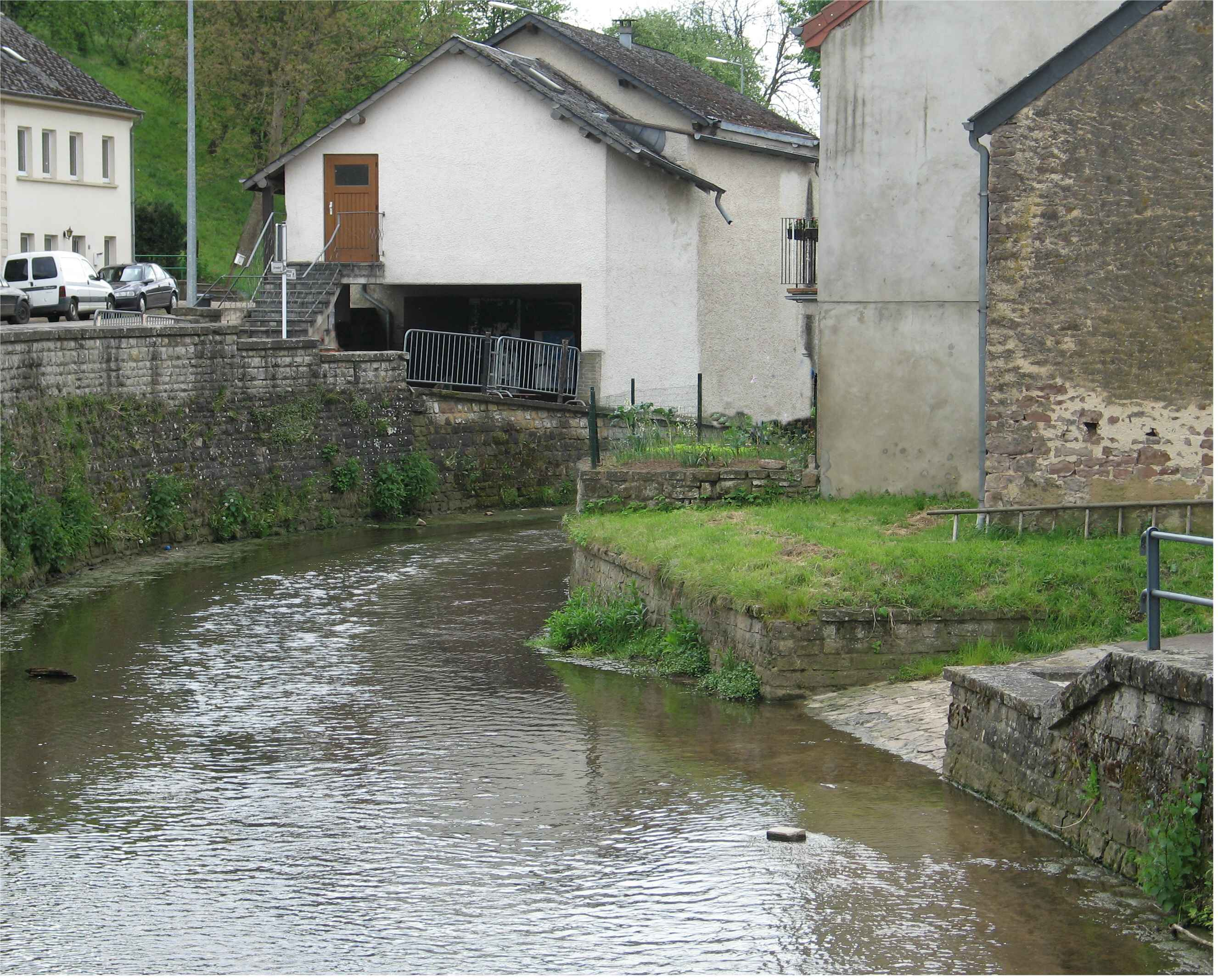 D'Wäiss Ernz zu Iermsdref.